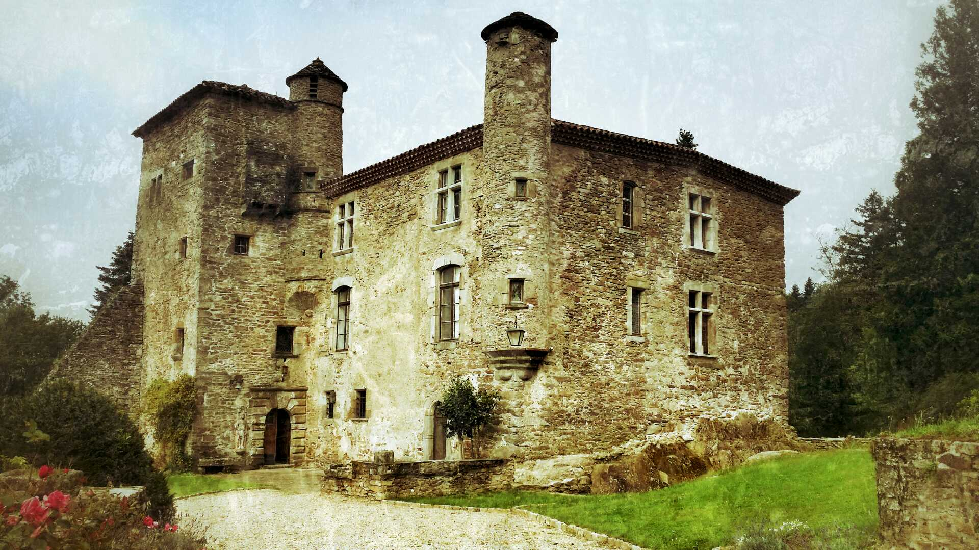 Vue sud est du chateau de Campan XIeme